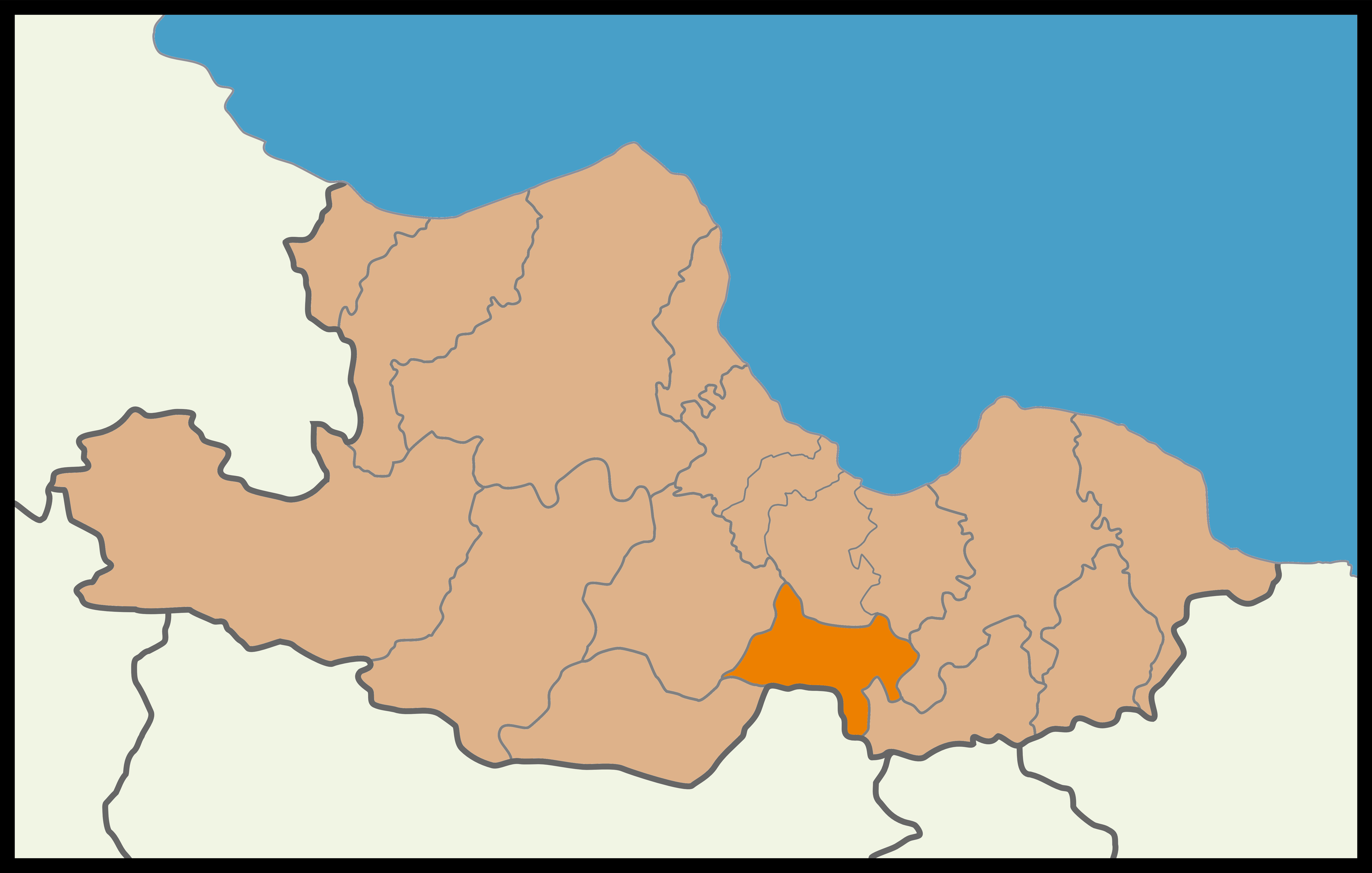 Samsun'un Asarcık ilçesinin 2015 Türkiye genel seçimleri haritası.